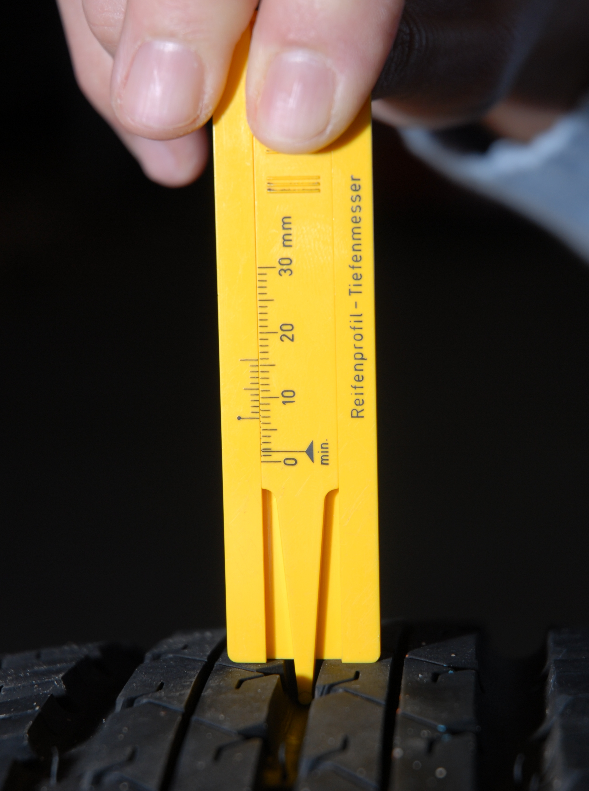 analoges Profiltiefenmessgerät aus Plastik